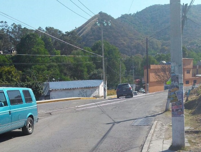 Paraje La Cruz San Bartolomé Coatepec.